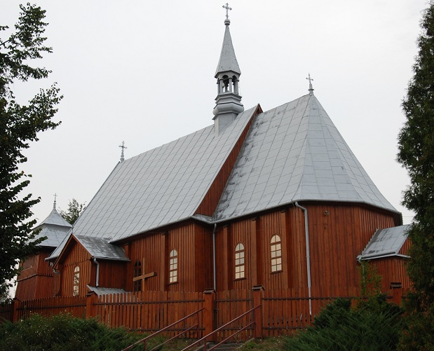 drewniany kościół parafialny p.w. św. Stanisława Biskupa w Brzeźnicy, (gmina Bochnia)